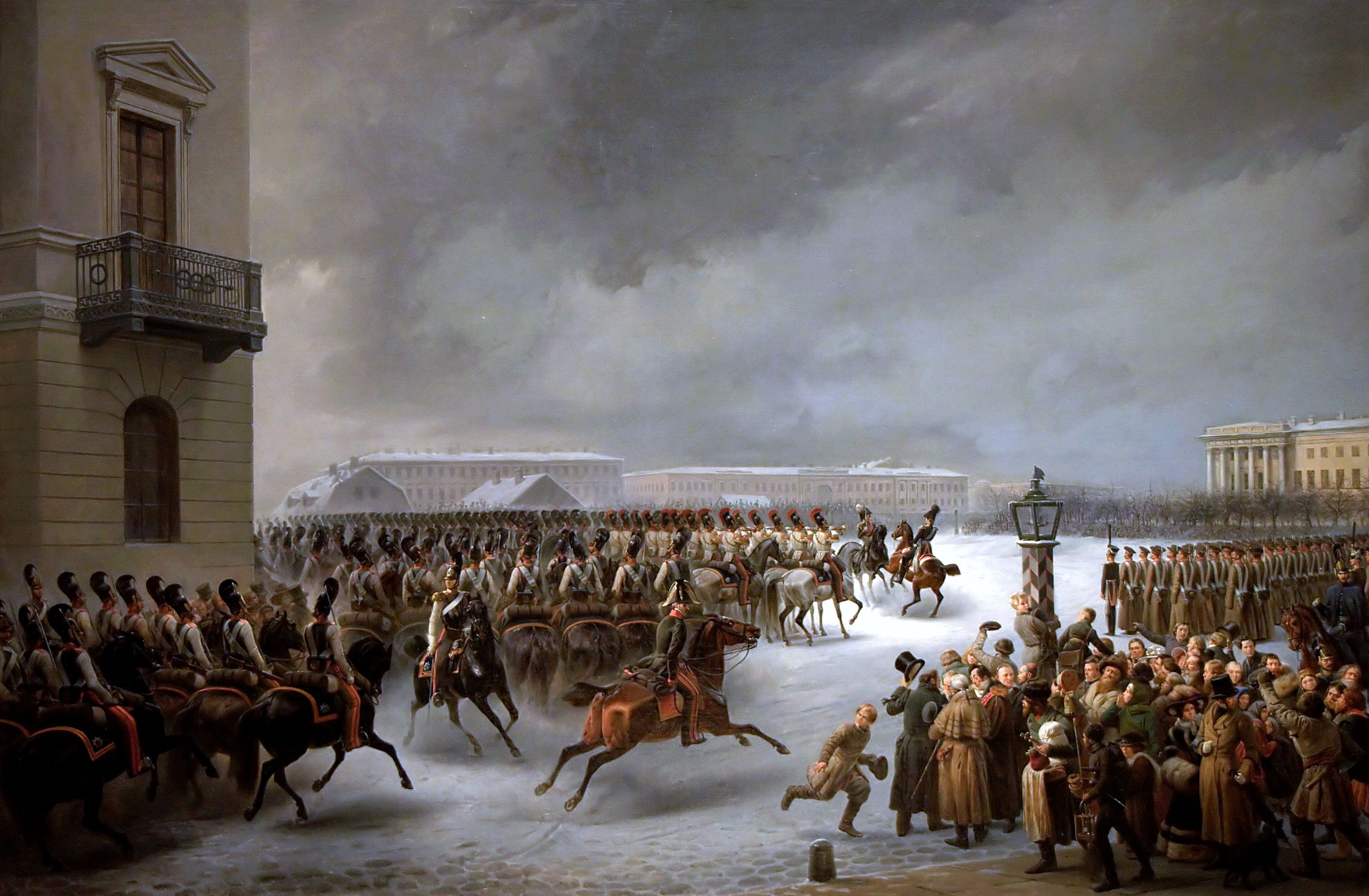 Lors de la révolte des décabristes initiée par des aristocrates progressistes, le régiment des gardes à cheval est intervenu pour réprimer ce mouvement hostile à Nicolas 1er.